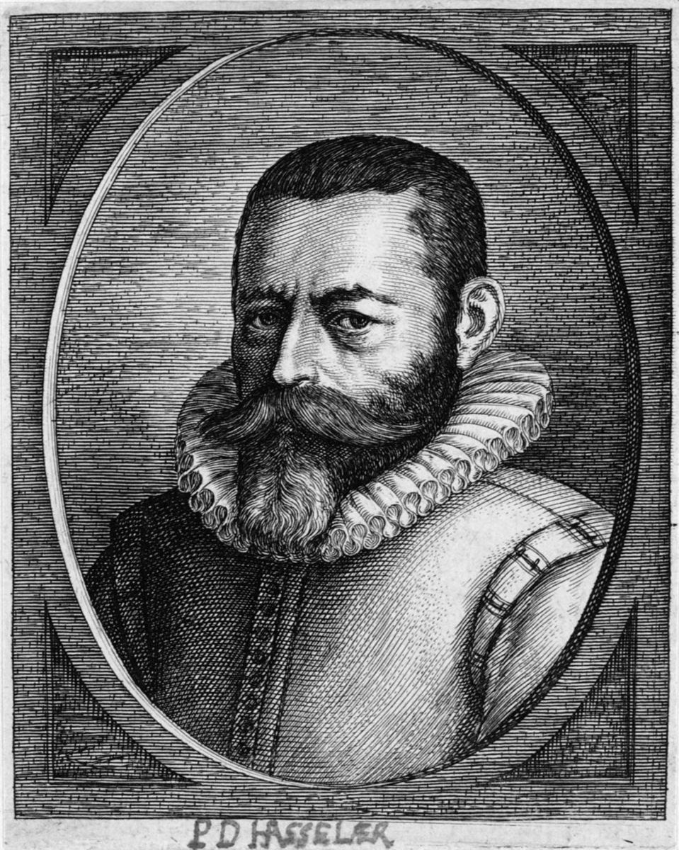 Pieter Dirksz. Hasselaer (1554 / 27-08-1616) Bierbrouwer; Schepen te Amsterdam in 1594; Bewindhebber VOC. 1602. Afmetingen: 96 x 72 mm.